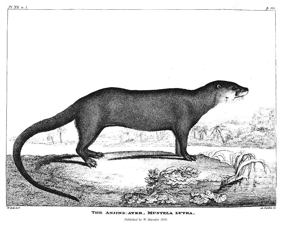 Anjing Ayer I